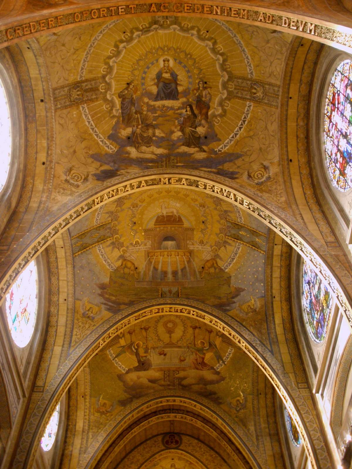 lica del Sagrado Corazón de Jesús (Gijón, Asturias)